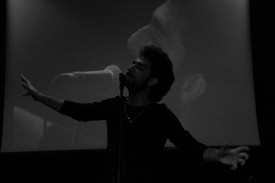 "TEDx Baku 2013" Bakı, Azərbaycan.